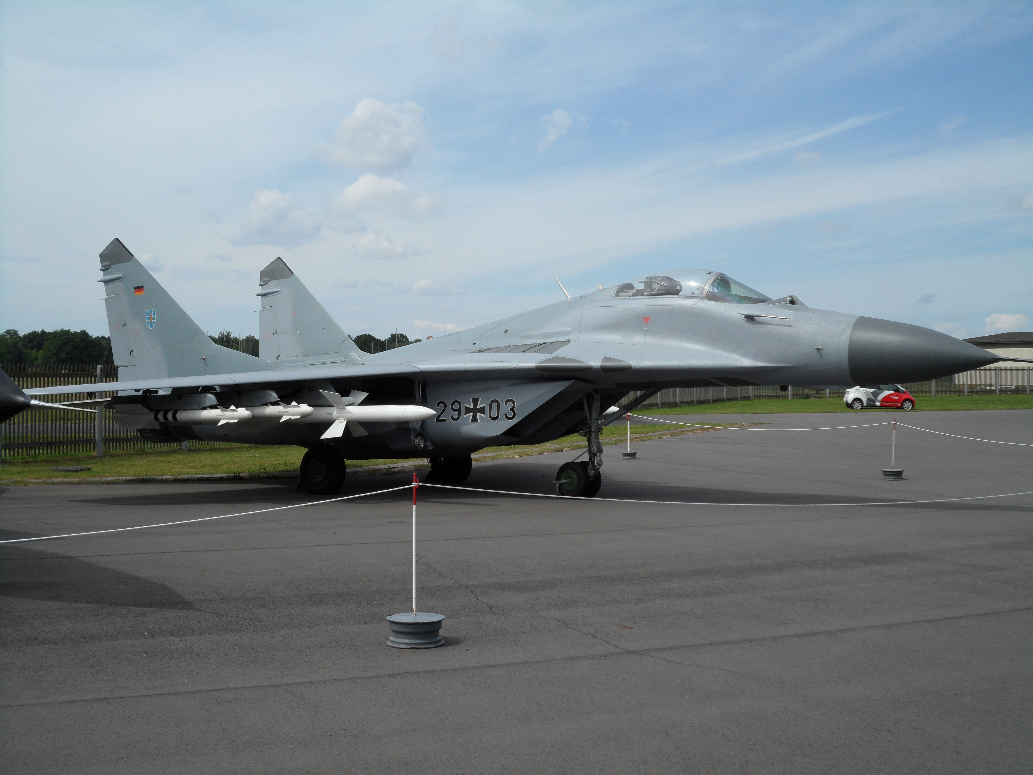 Militärhistorisches Museum Flugplatz Berlin-Gatow